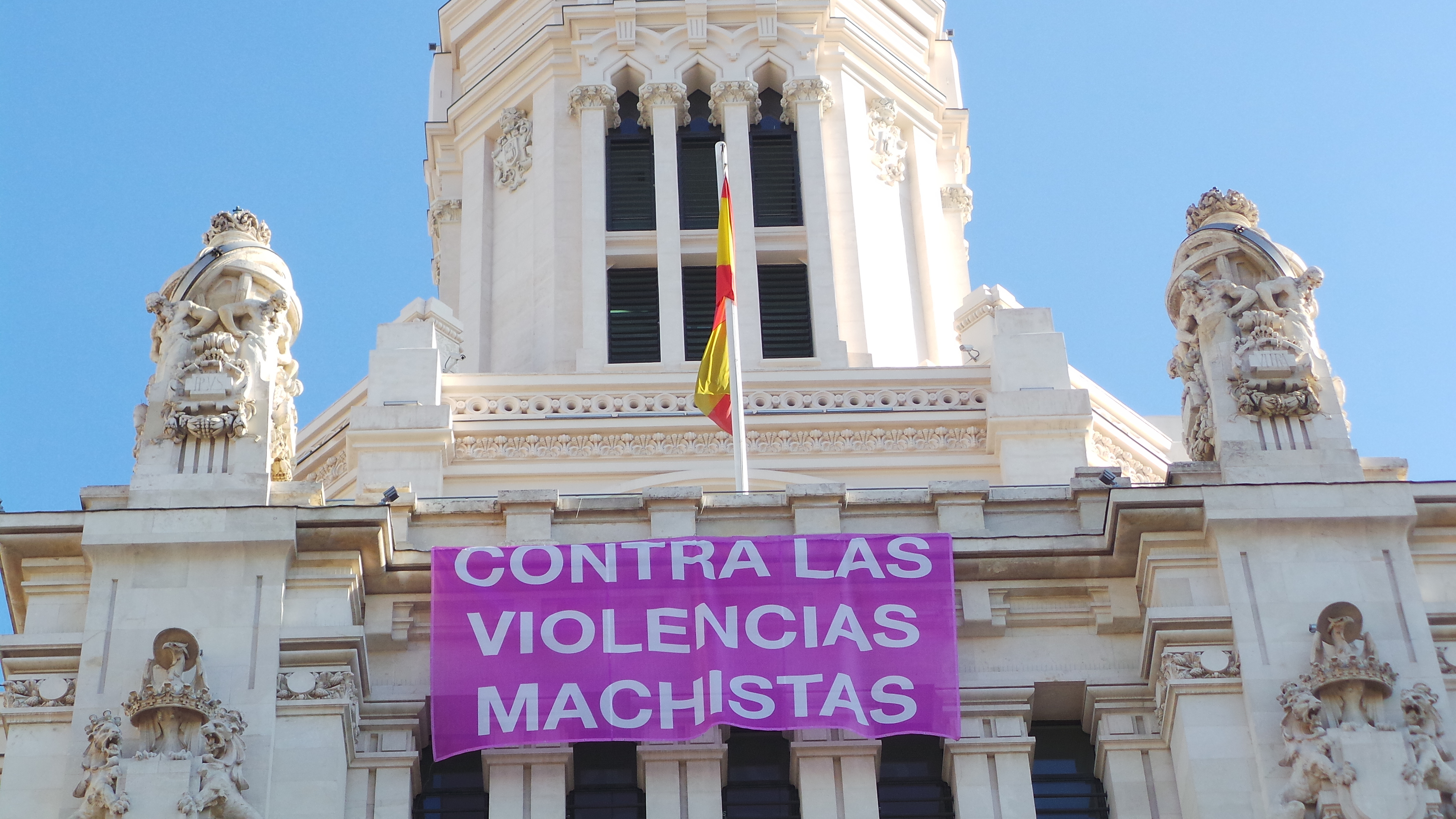 Banderola en el Ayuntamiento de Madrid en apoyo del 7N Marcha Estatal contra las violencias machistas